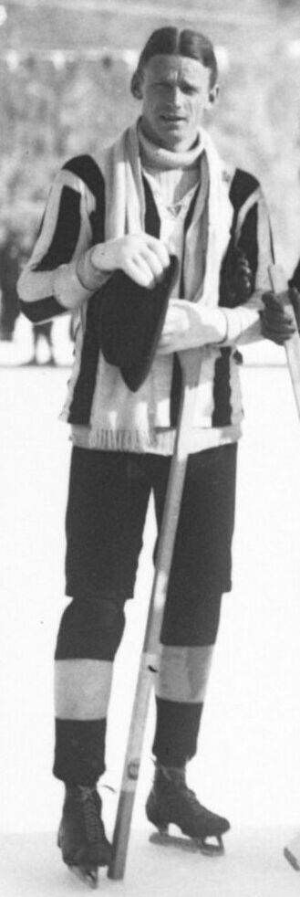 Hans Georgii, 29 juni 1889, död 11 juni 1970, Sveriges första dokumenterade ishockeyspelare